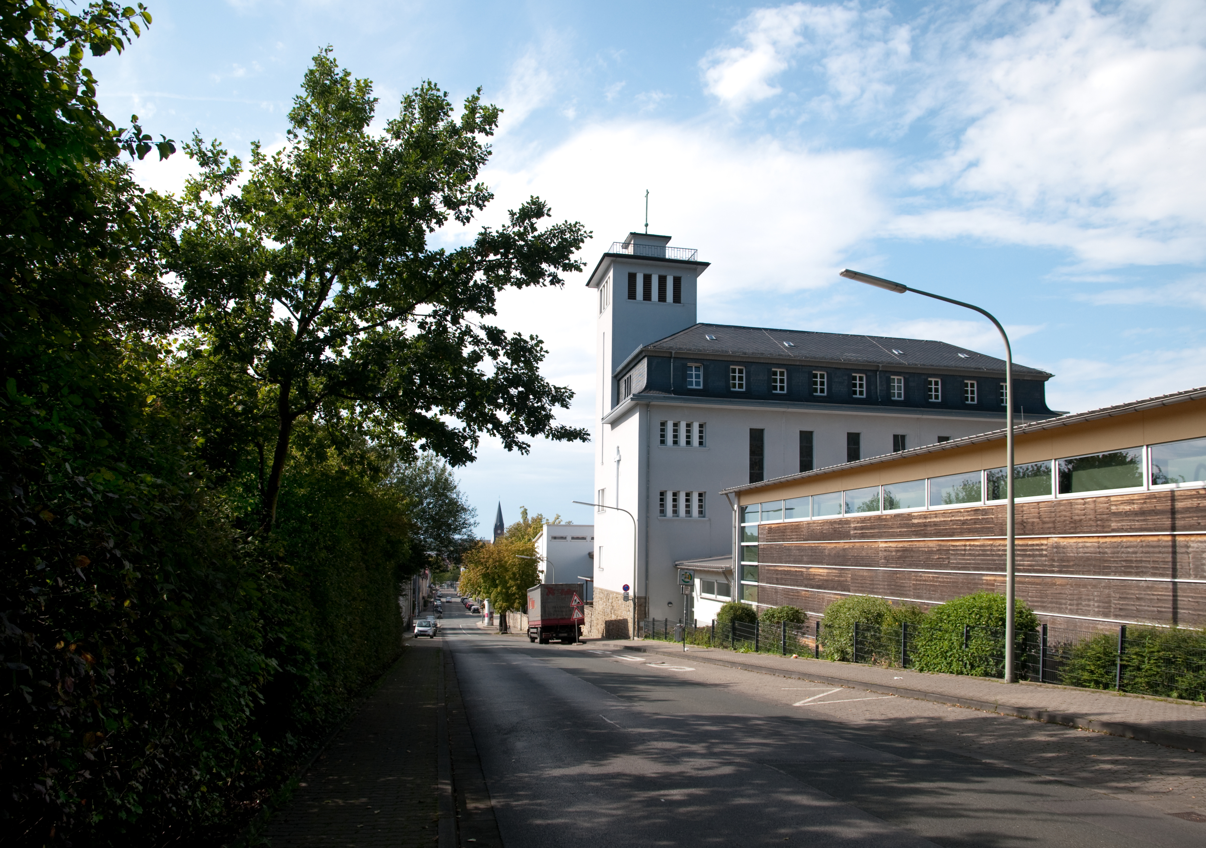 Gymnasium Im Stadtteil Neheim